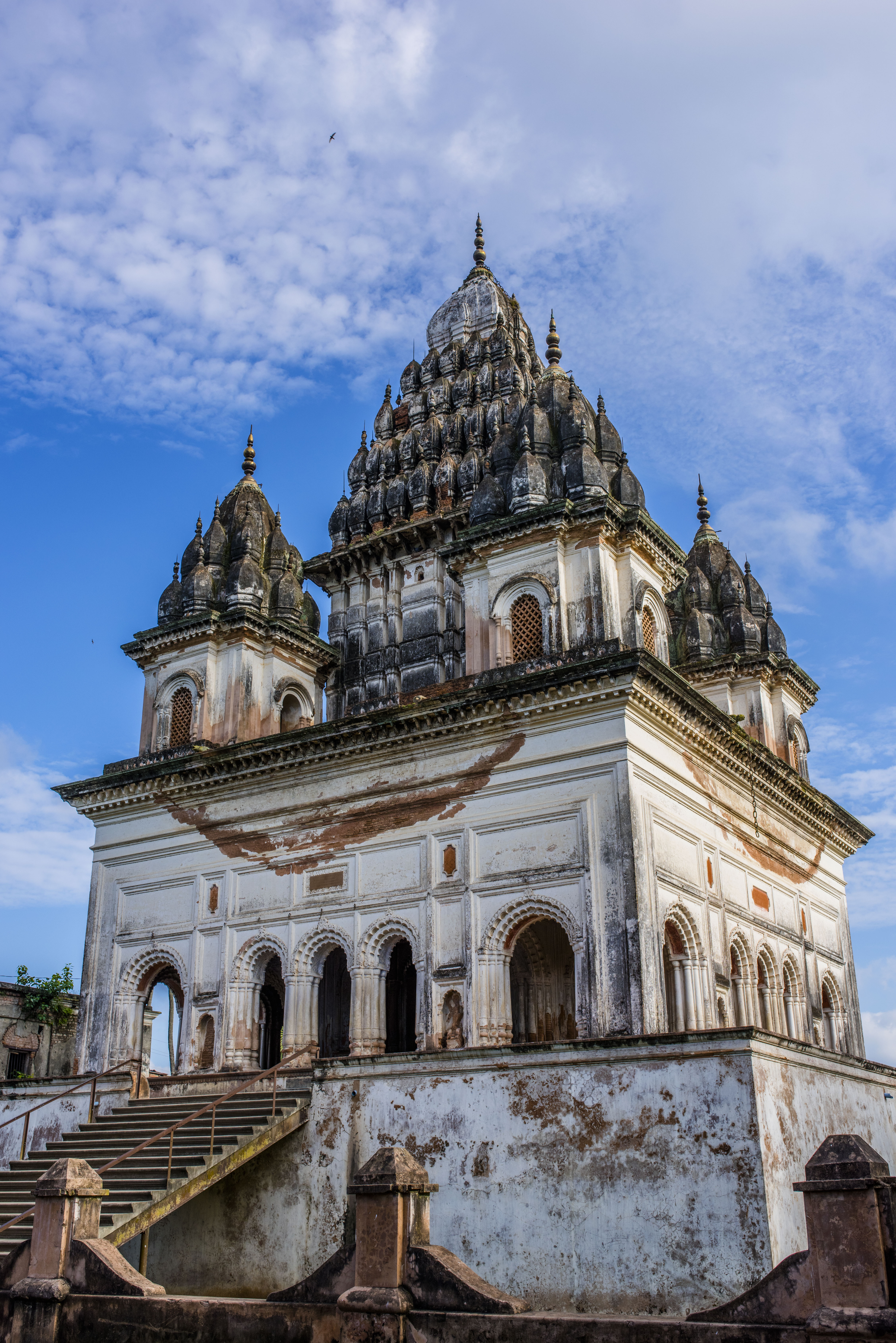 বড় শিব মন্দির